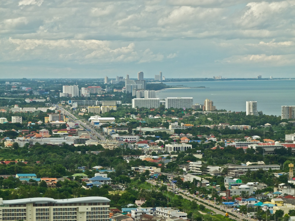 Busy Hua Hin